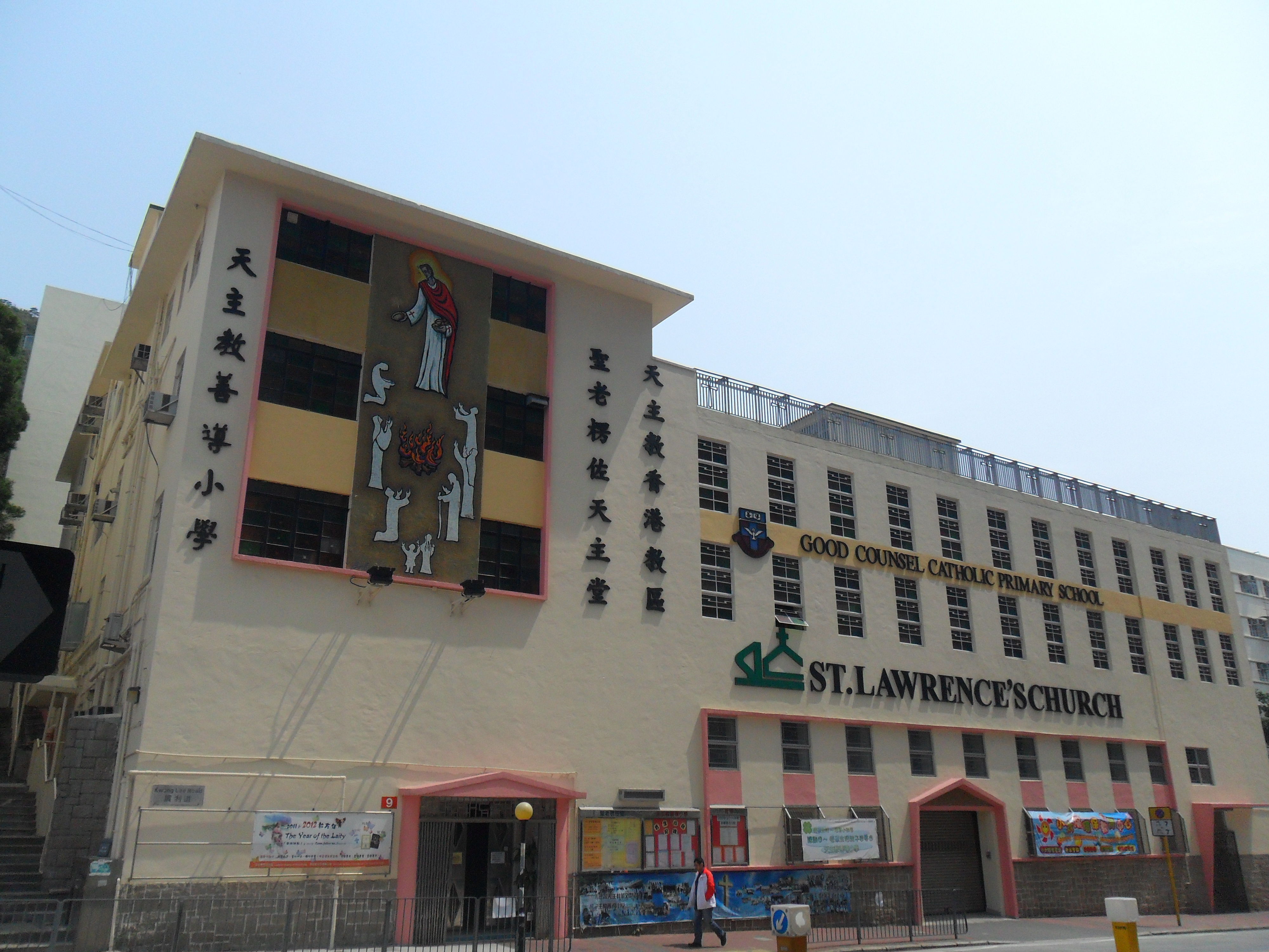 中文（香港）: 聖老楞佐堂, 香港, 中國